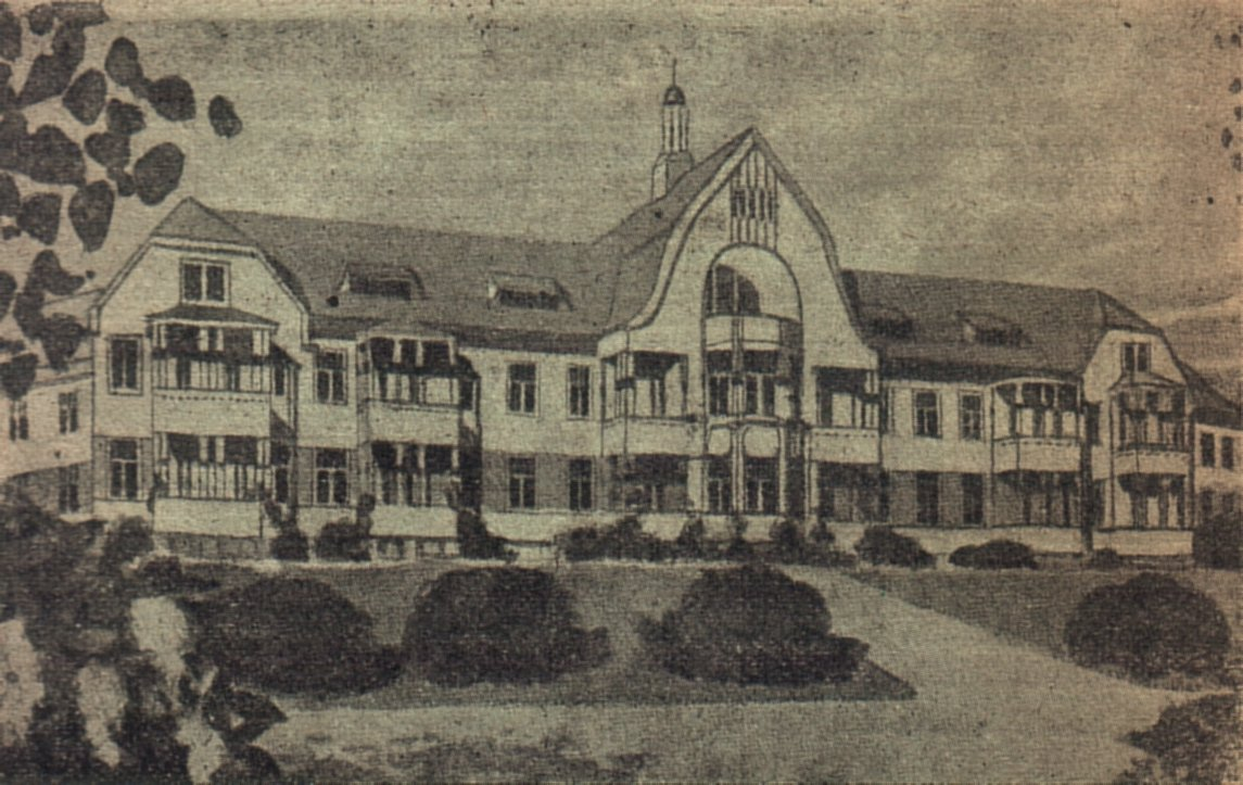 Cанаторий Конккала (сейчас Красный Холм), 1911 год.